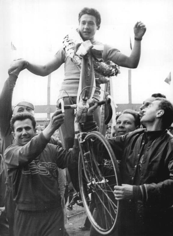 Juri Melichow Zentralbild Wendorf 17.5.1961 XIV. Internationale Friedensfahrt Warschau-Berlin-Prag 1961. 13. und letzte Etappe von BRNO nach Prag am 16.5.61. Die XIV. Internationale Friedenfahrt klang am 16.5.1961 in Prag mit einem Triumph der sowjetischen Fahrer aus. Sie belegten nicht nur durch Juri Melichow und Olympiasieger Viktor Kapitonow die ersten beiden Plätze in der Einzelwertung, sondern feierten auch im Mannschaftsklassement einen überlegenen Sieg vor der DDR und Rumänien. UBz: Mit Juri Melichow gewann verdient der stärkste Fahrer des Feldes die Einzelwertung.